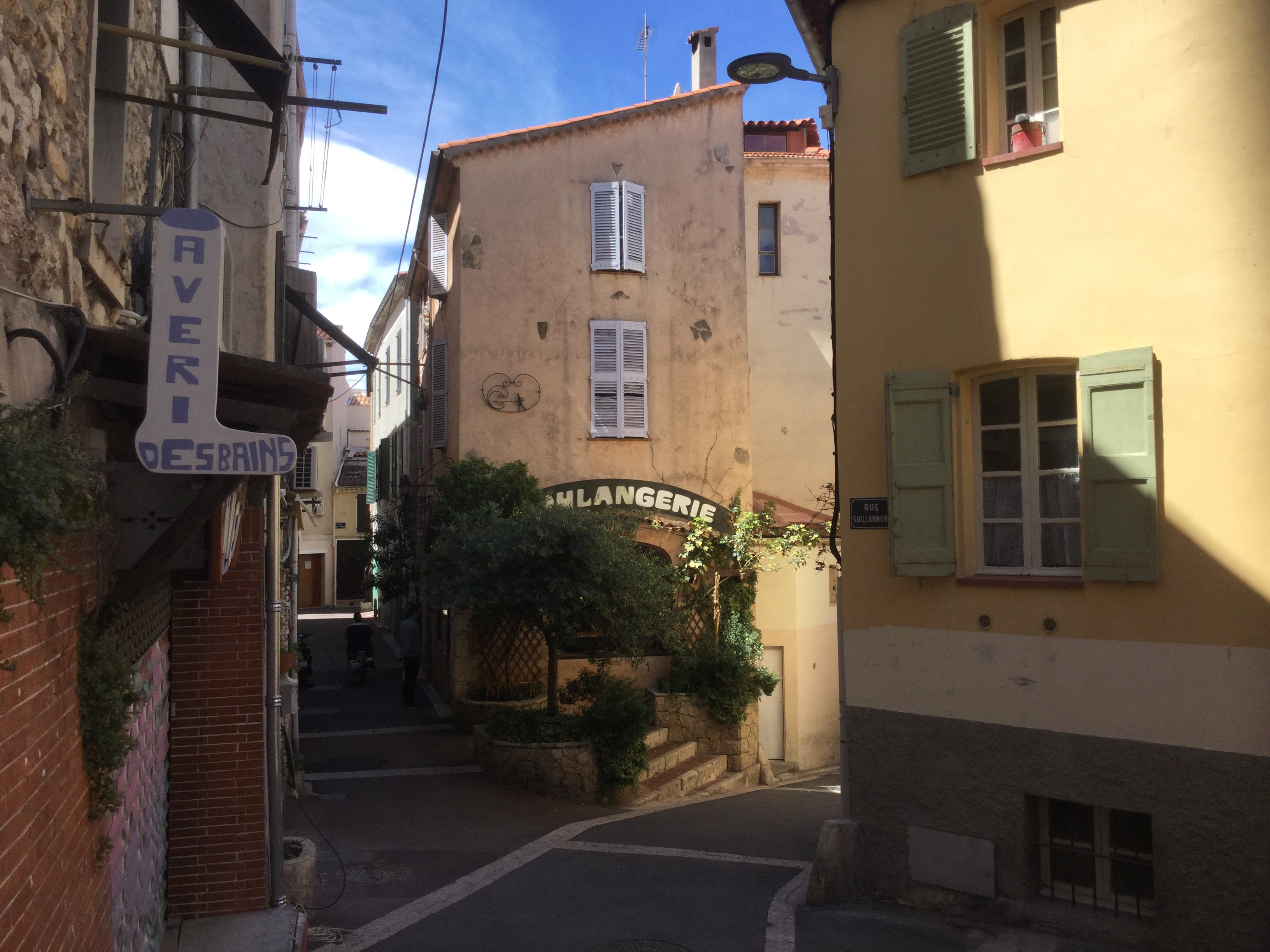 Marché provencal_Antibes_maj 2016